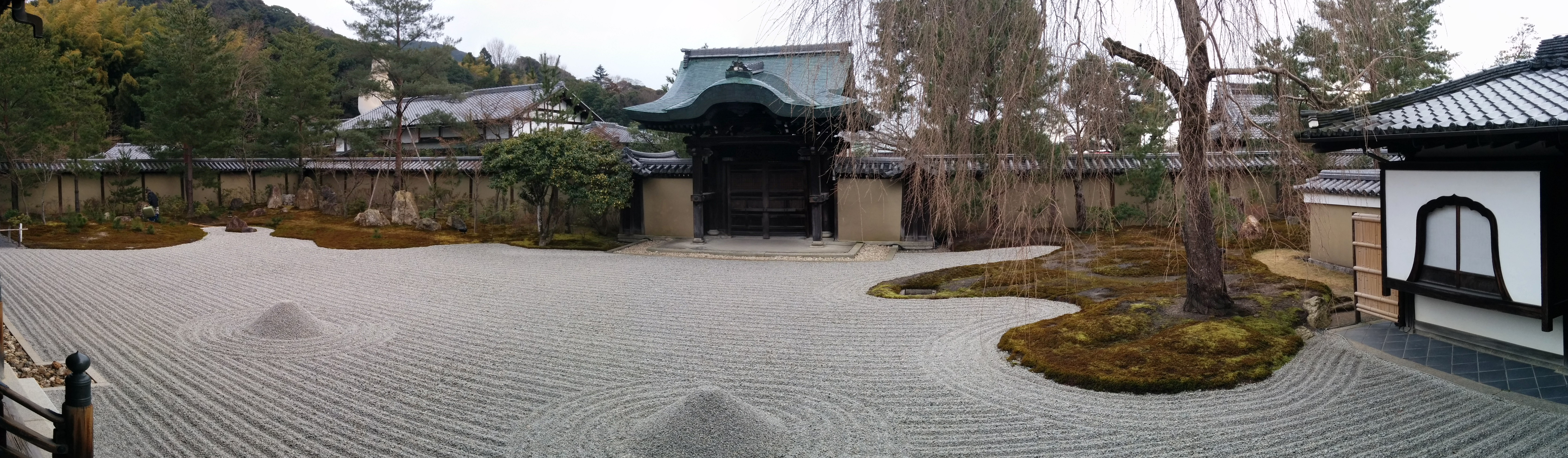 Japan